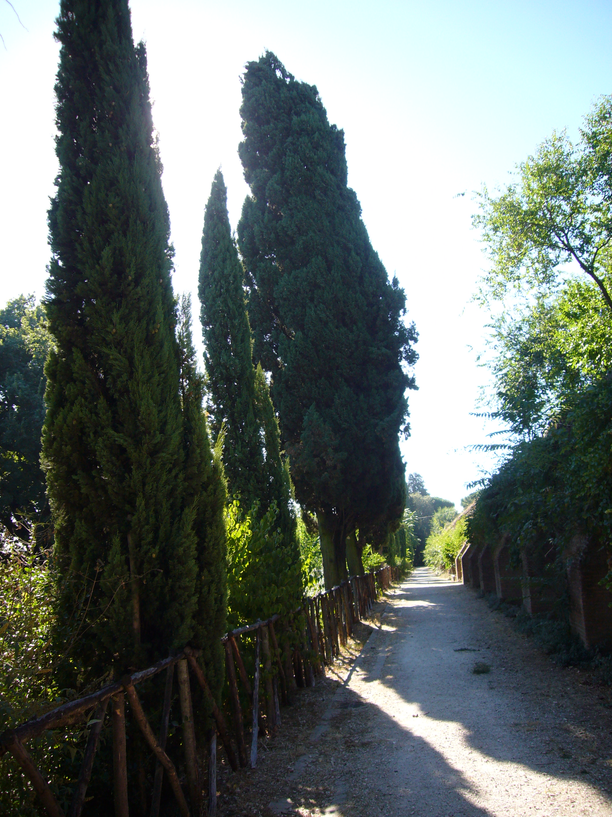 Roma, villa Sciarra: passeggiata lungo le mura gianicolensi